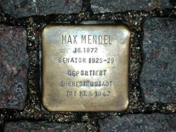 Stolperstein vor dem Eingang des Hamburgischen Rathauses zum Gedenken an Max Mendel.